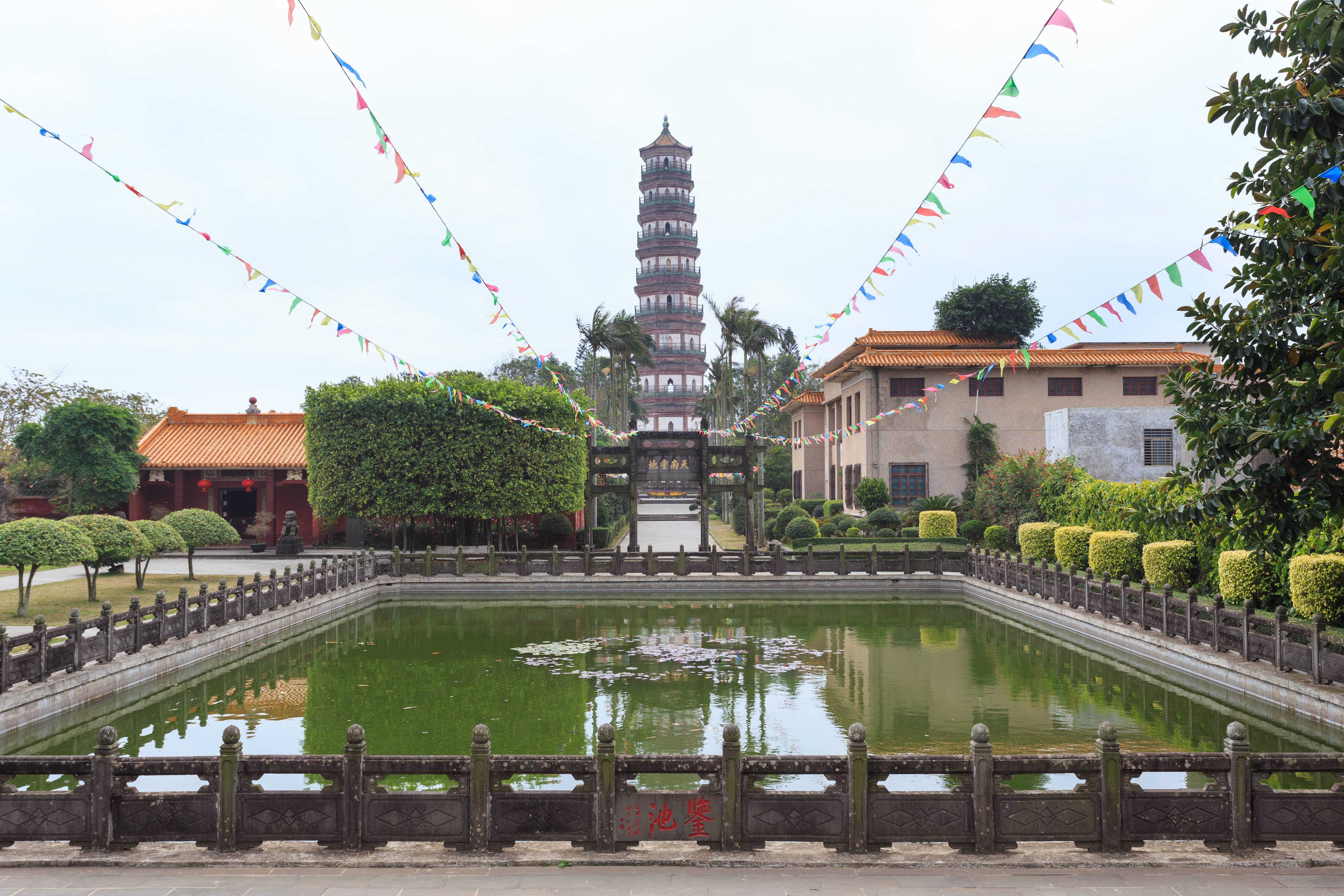 广东省雷州市三元塔—— 鉴池和三元塔